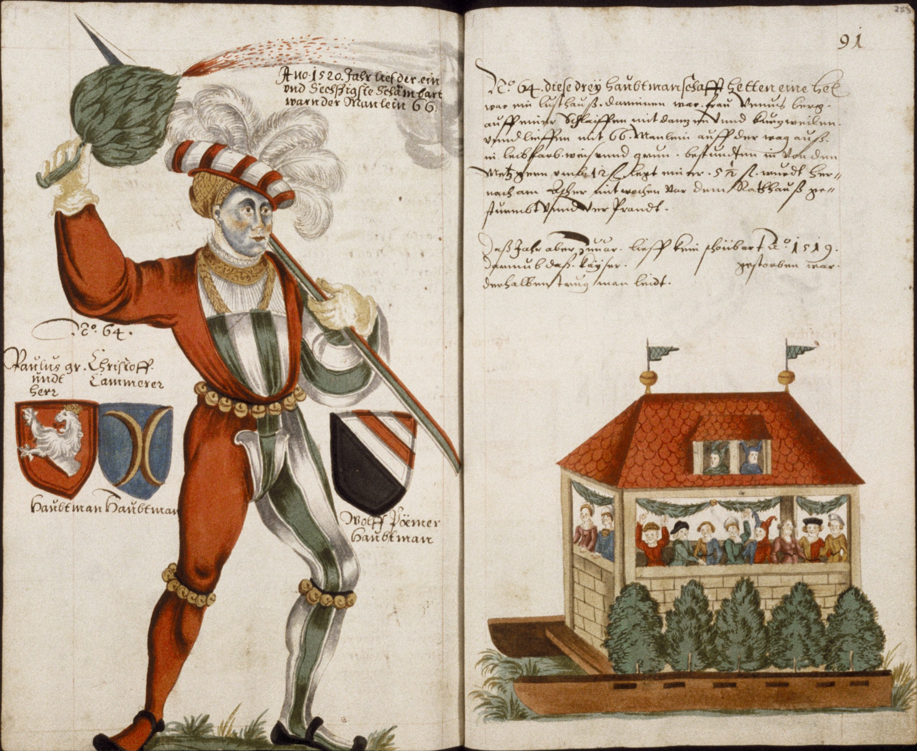 Schembartbuch. Nürnberg. Oxford, Bodleiana Library, MS. Douce 346, Blatt 252v-253r; Wappen Grundherr, Cammerer, Pömer